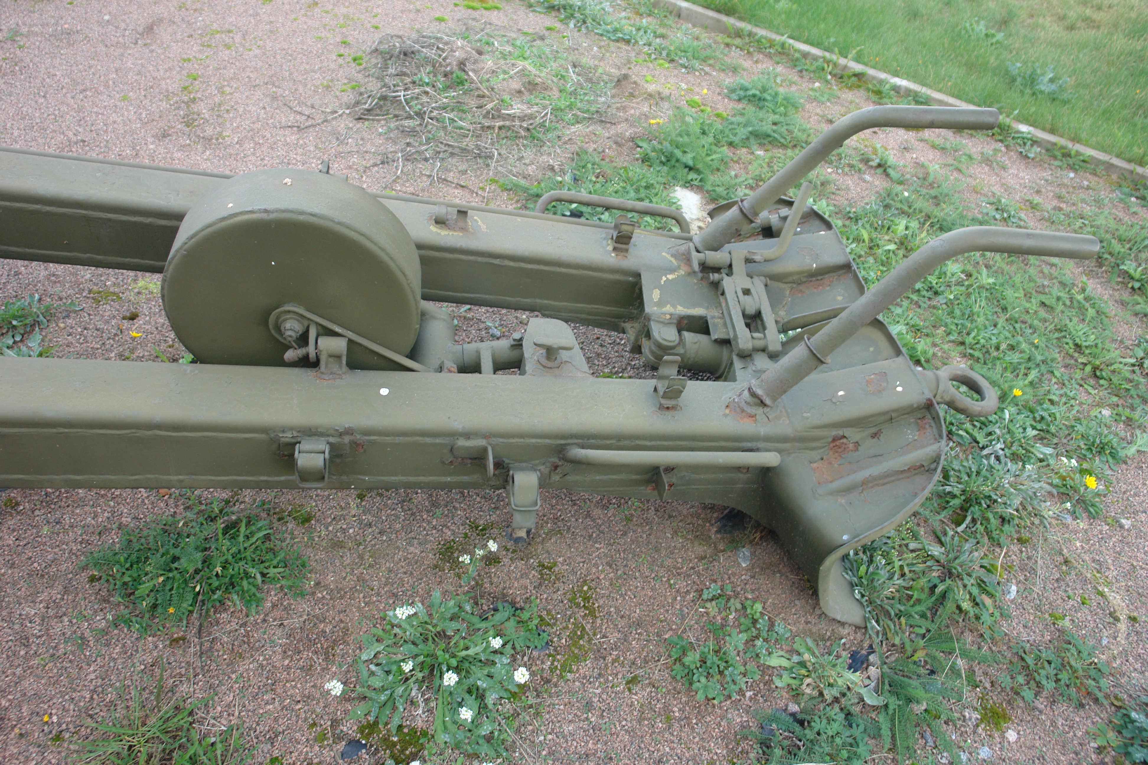 100-мм ПРОТИВОТАНКОВАЯ ПУШКА Т-12 (2А19) "РАПИРА" ПРИНЯТА НА ВООРУЖЕНИЕ В 1961 г. ГЛАВНЫЙ КОНСТРУКТОР Г.И.ЛУКЬЯНЧЕНКО. lbHOCTb, M: СТРЕЛЬБЫ-6000, ПРЯМОГО ВЫСТРЕЛ СКОРОСТРЕЛЬНОСТЬ - ДО 14 ВЫСТР/МИН. МАССА ОРУДИЯ-2800. РАСЧЕТ - 7 ЧЕЛОВЕК. Военно-исторический музей артиллерии, инженерных войск и войск связи, Санкт-Петербург.